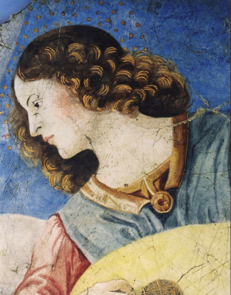 fragmentdetail